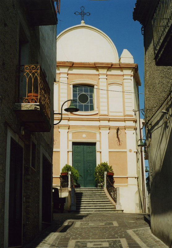 Facciata della cattedrale di Calopezzati (Cosenza)